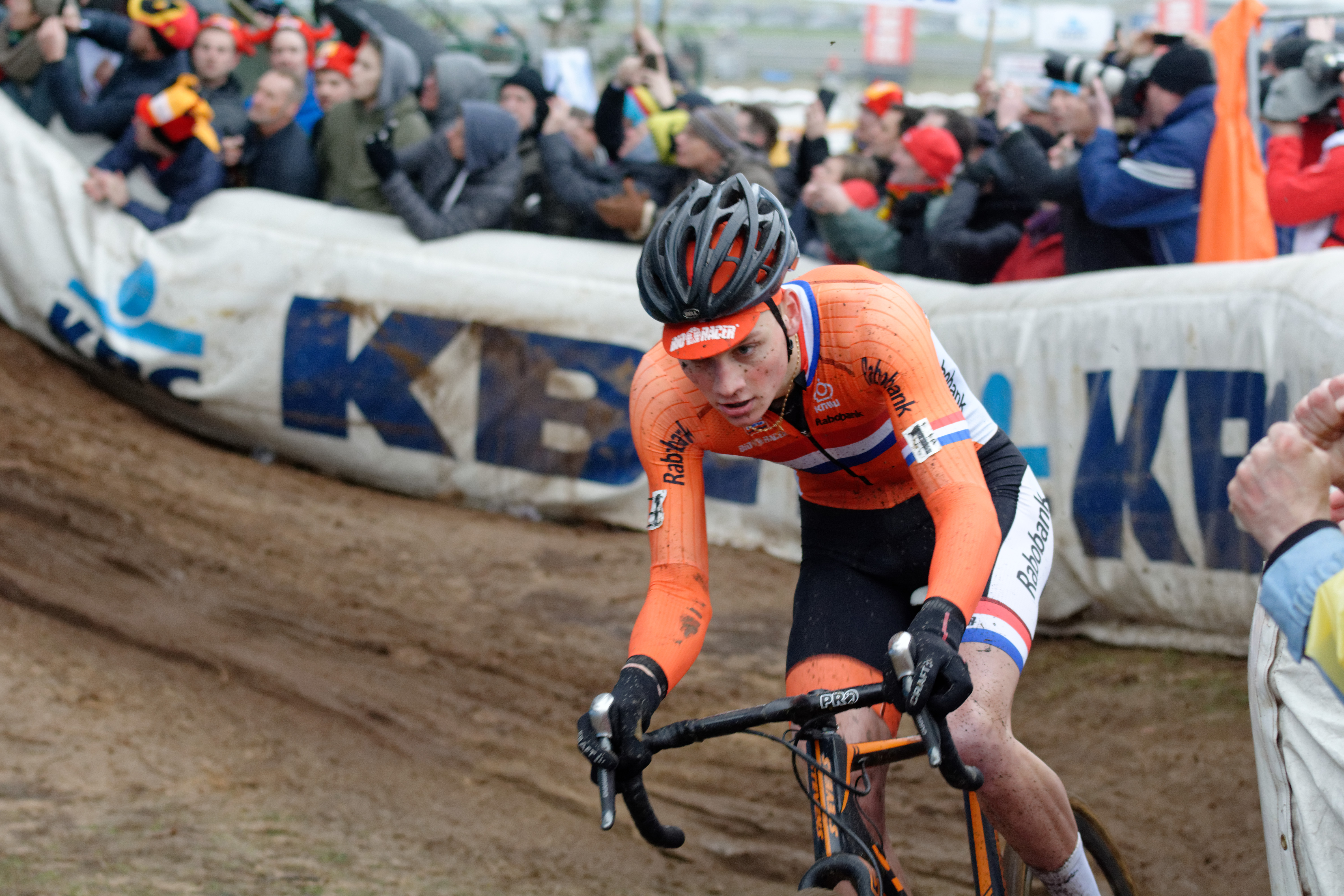 Mathieu van der Poel tijdens het wereldkampioenschap veldrijden in 2016